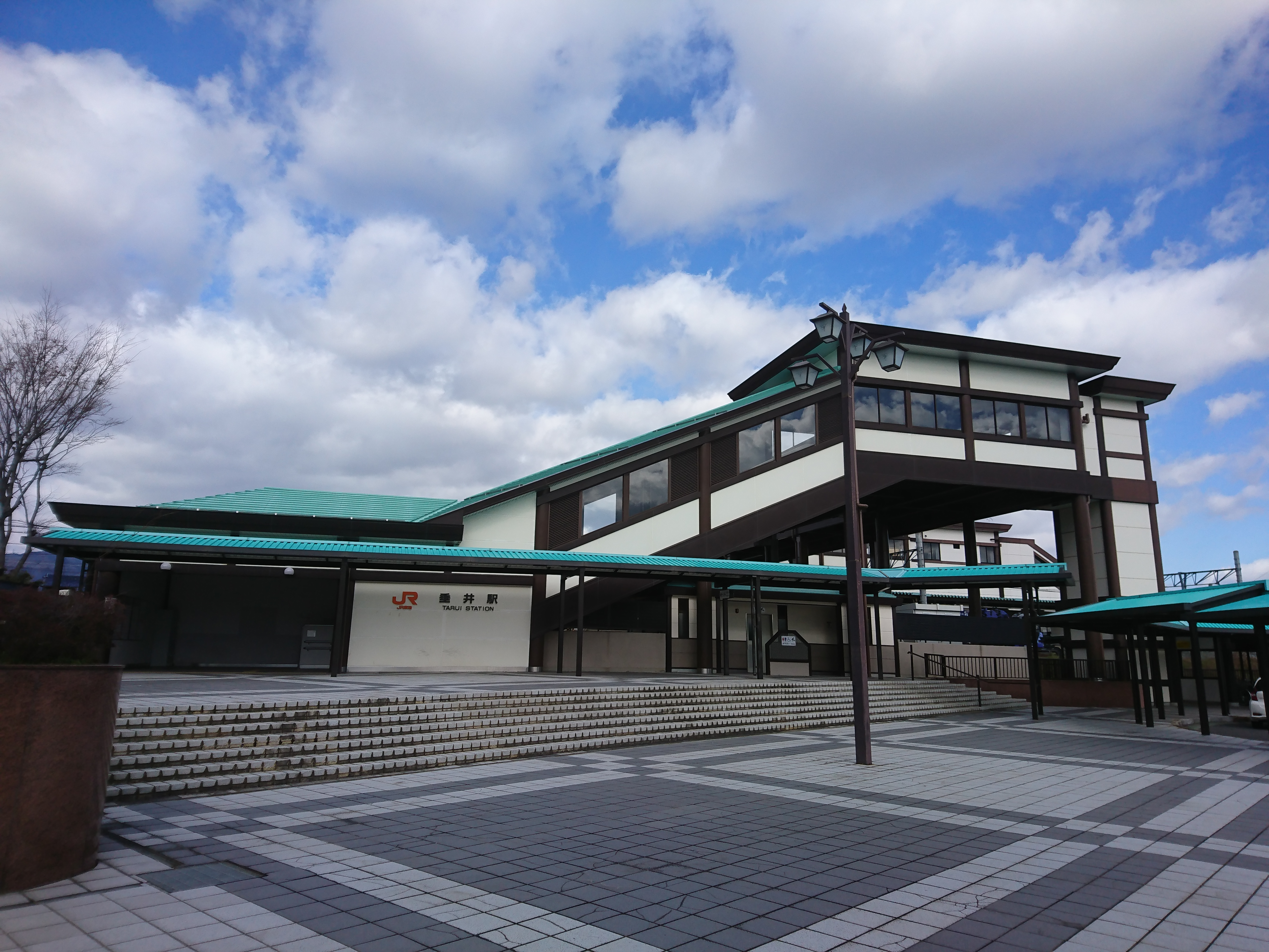 垂井駅南口 2019年